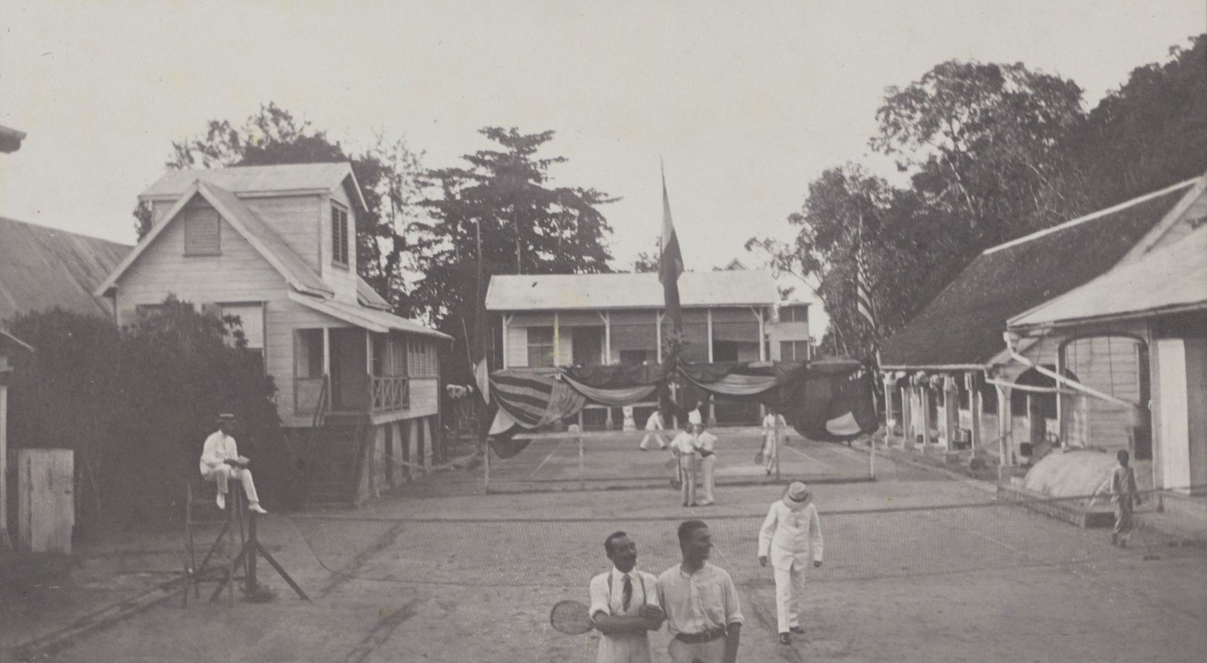 IdentificatieTitel(s): TennismatchObjecttype: foto Objectnummer: NG-2009-128-15-2Opschriften / Merken: opschrift, tussen de foto's, handgeschreven: ‘Op de tennisbaan tijdens de matches met de officieren v H. M. Zeeland. Juli 1912’Omschrijving: Tenniswedstrijd met de officieren van het Pantserdekschip Hr. Ms. Zeeland op de tennisclub in Paramaribo, juli 1912. Onderdeel van het fotoalbum over het leven van de familie Gonggrijp in Suriname rond 1912.VervaardigingVervaardiger: fotograaf: anoniemPlaats vervaardiging: ParamariboDatering: jul-1912Materiaal: fotopapier Techniek: fotografieAfmetingen: h 60 mm × b 108 mmOnderwerpWat: tennis, lawn-tennisWanneer: 1912 - 1912Waar: SurinameParamariboVerwerving en rechtenCredit line: Schenking van mevrouw B. Feith-Schnitger, VordenVerwerving: schenking 12-okt-2009Copyright: Publiek domein